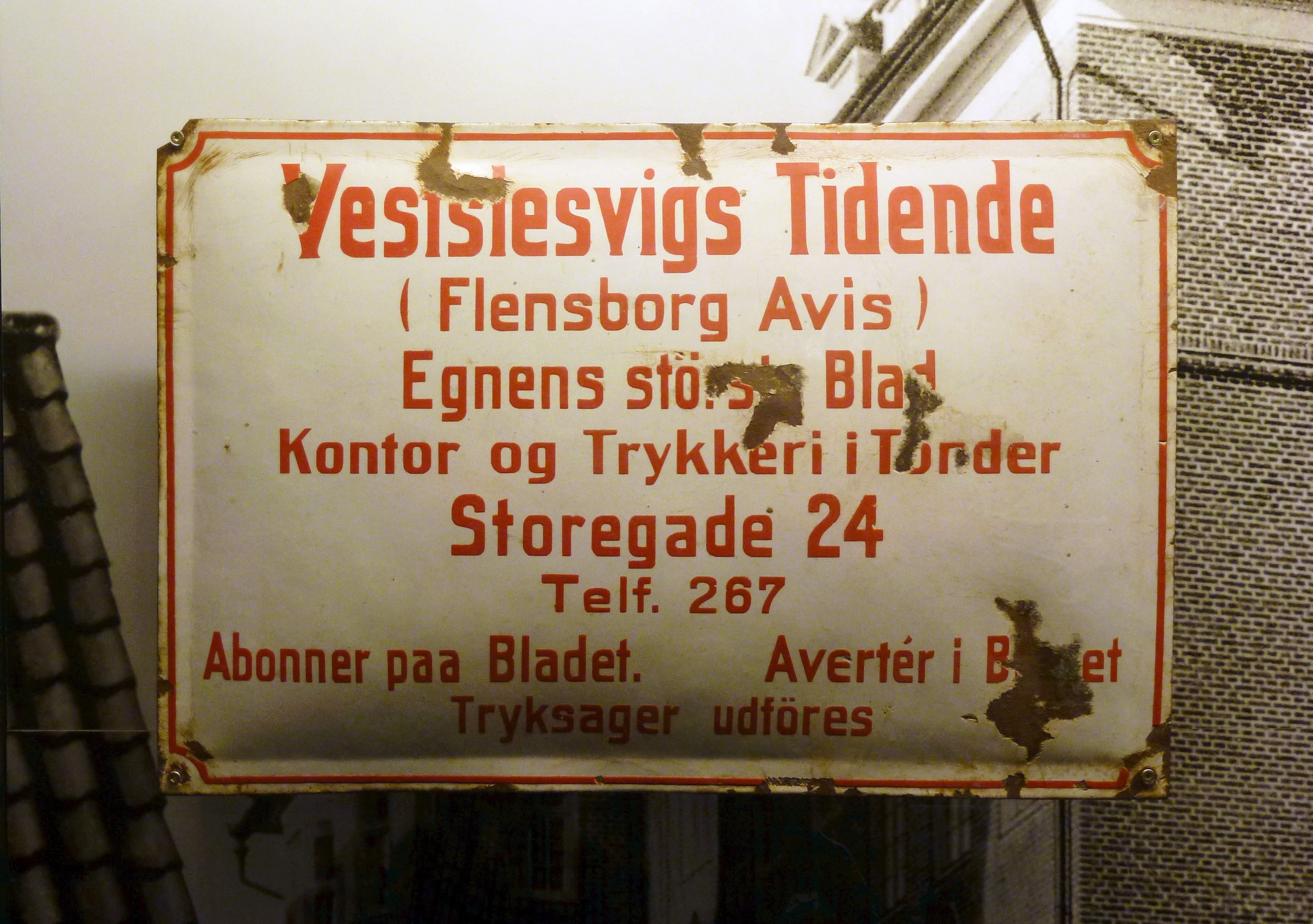 Danewerk Museum, Interiör